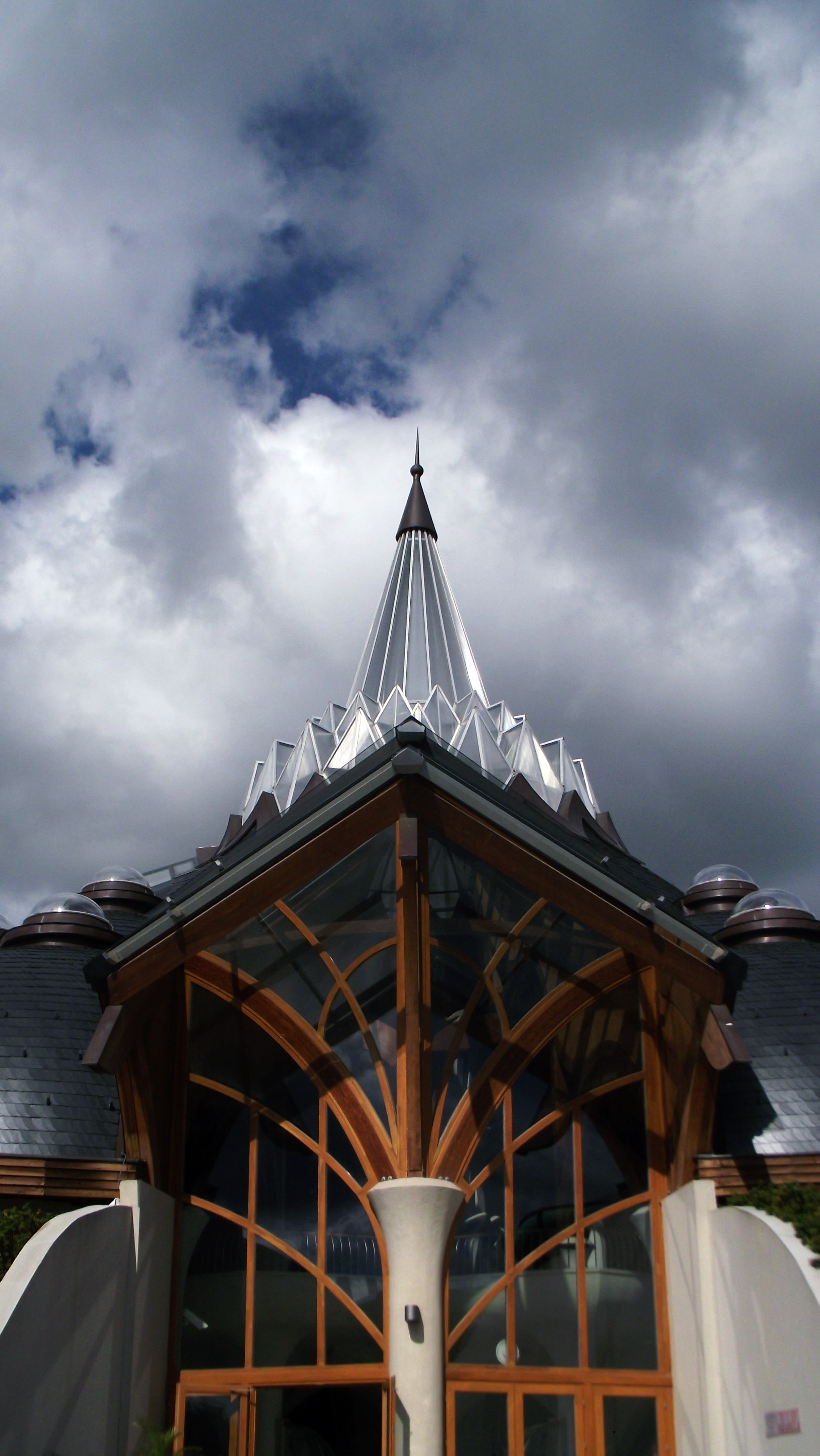 A Makói Hagymatikum 2014 nyarán. Bejárat a medencék felől, az üvegtoronnyal.